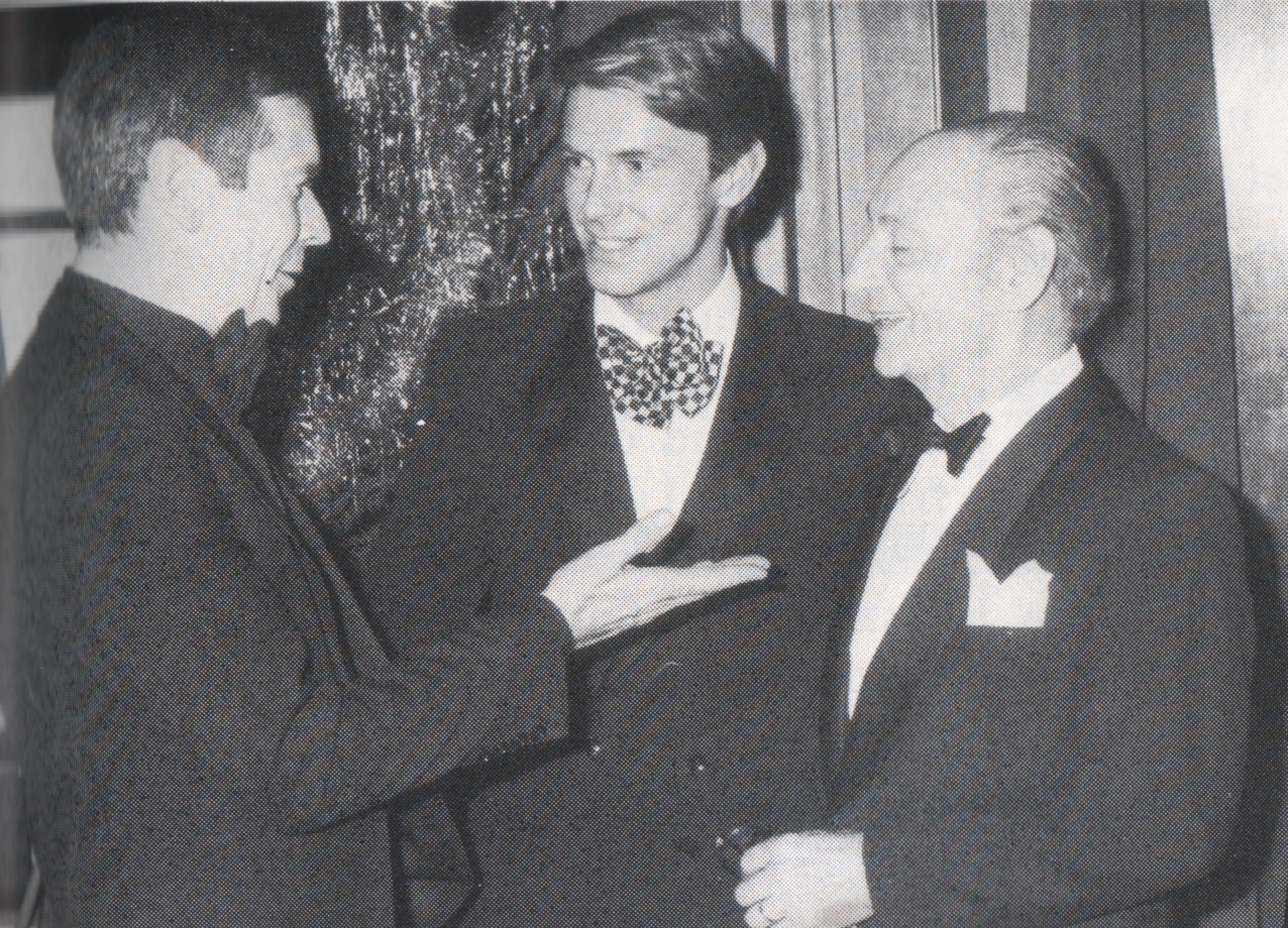 Von links: 1) Dieter Kunze, Kürschnermeister aus Mannheim 2) Wolfgang Joop, Designer 3) Heinz Müller, Pelzkonfektionär Aufgenommen anlässlich der Modenschau zum 65. Geburtstags des Pelzkonfektionärs Heinz Müller, seit 1945 tätig in Frankfurt am Main (geb. 5. Dezember 1914) im Bankettsaal des „Hotel Frankfurter Hof“.